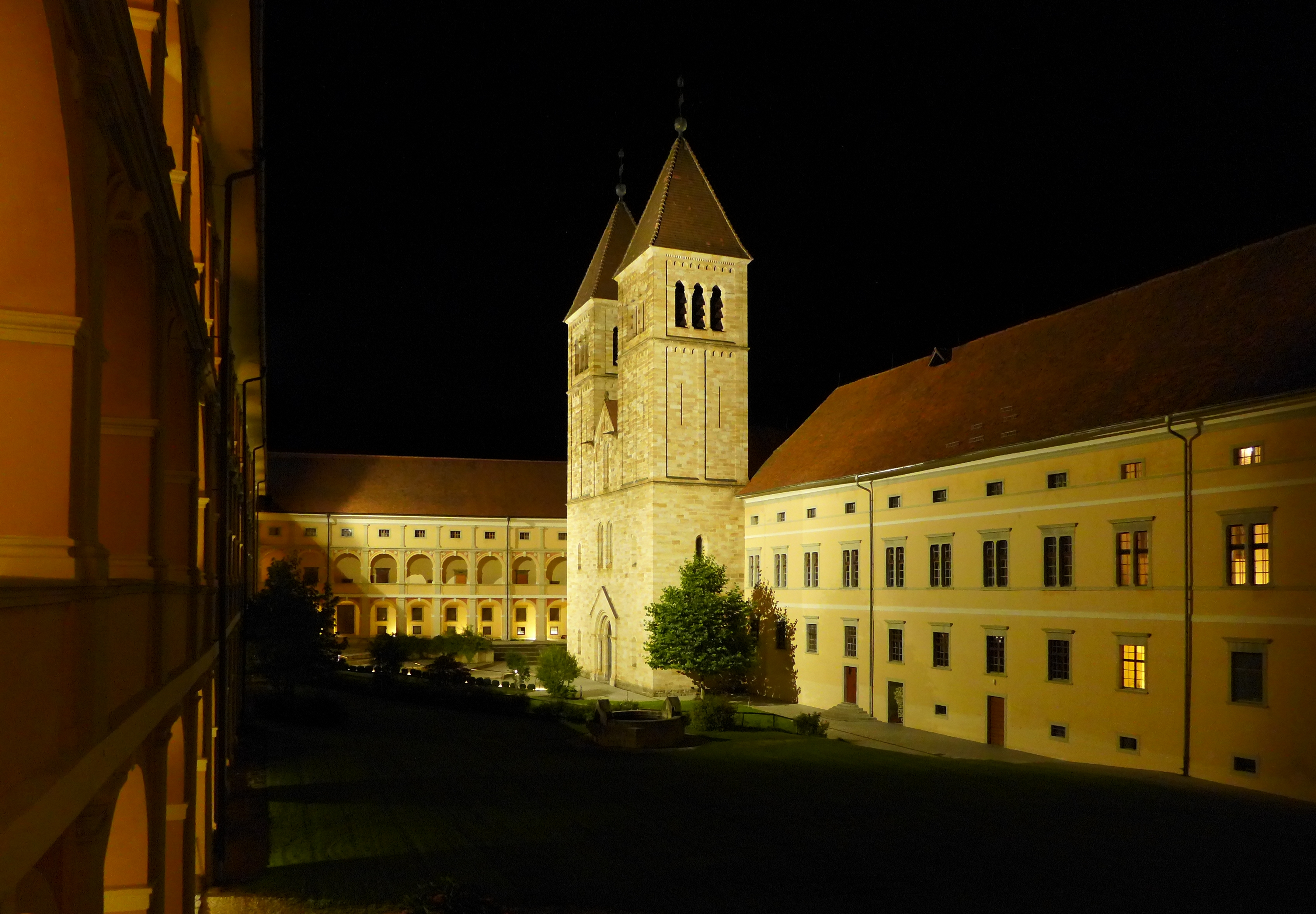 Äußerer Klosterhof Benediktinerabtei Seckau bei Nacht